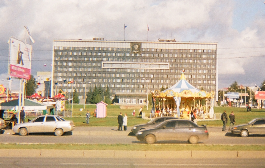 Здание Законодательного Собрания Пермской области